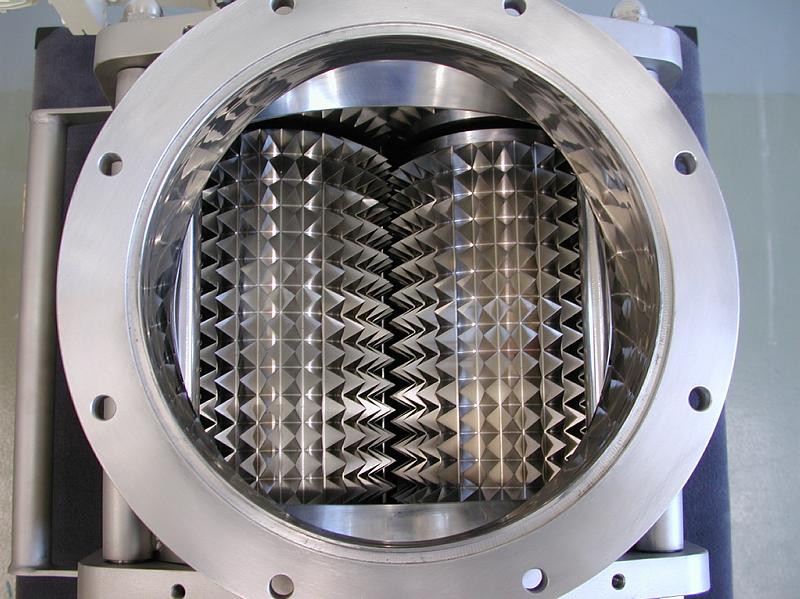 Einlauf eines Walzenbrechers